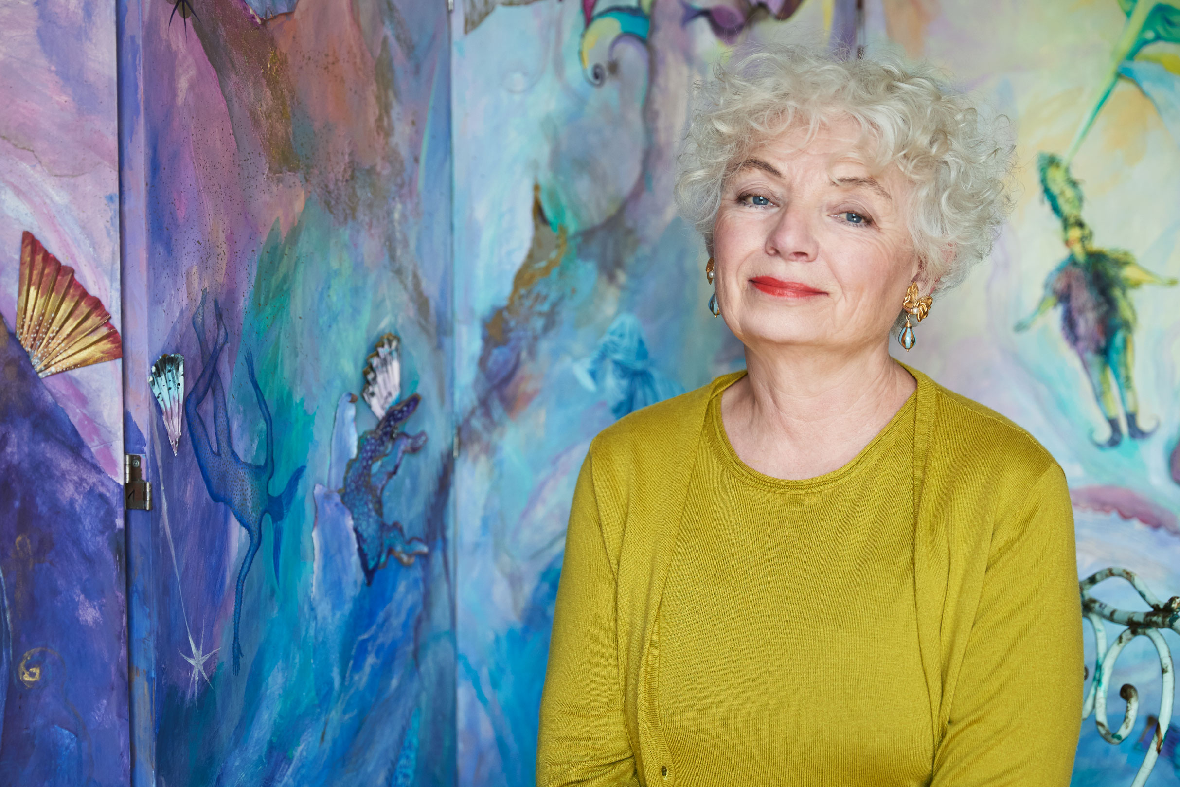 Alle Bildrecht liegen bei Frau Tatjana Hauptmann.